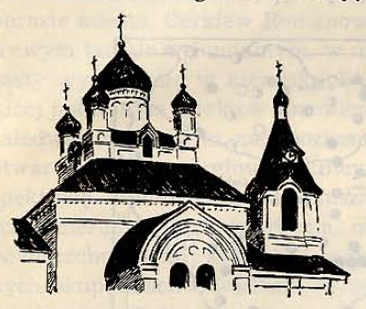 Беларуская (тарашкевіца): Вялейка (Vialejka), пляц Рынак (plac Rynak). Царква Марыі Эгіпецкай